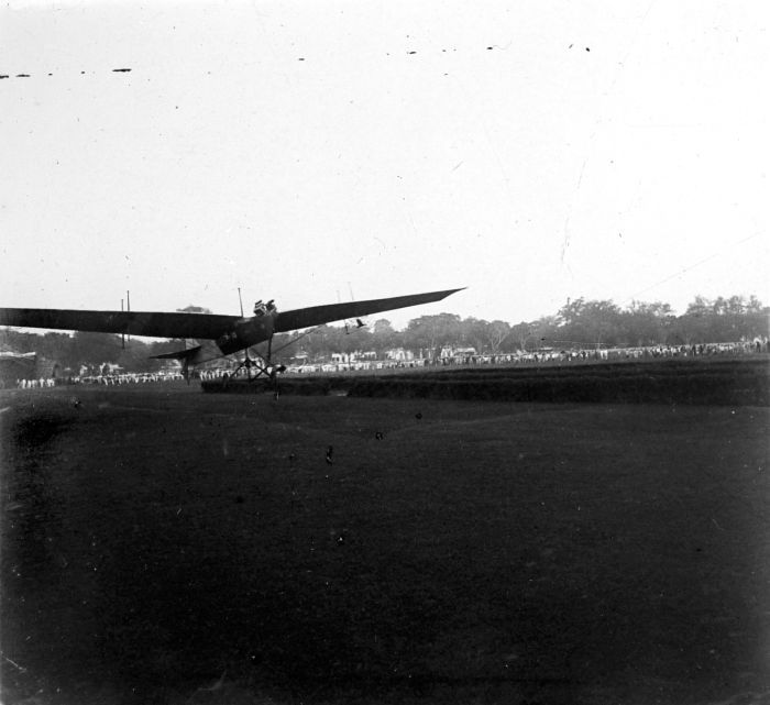 Repronegatief. Küller stijgt op van het Koningsplein in Weltevreden (Java) tijdens de eerste vliegproeven in Indië